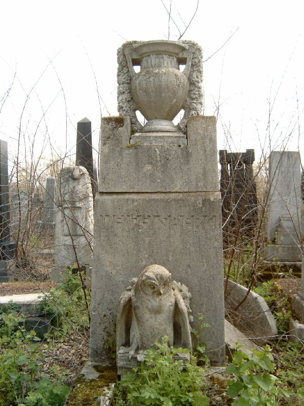 Veigelsberg Leó (Nagyboldogasszony, 1846. január 18. – Budapest, 1907. október 31.) újságíró (Ignotusnak, a Nyugat főszerkesztőjének apja) sírja Budapesten. Kozma utcai izraelita temető: 5-1-10.